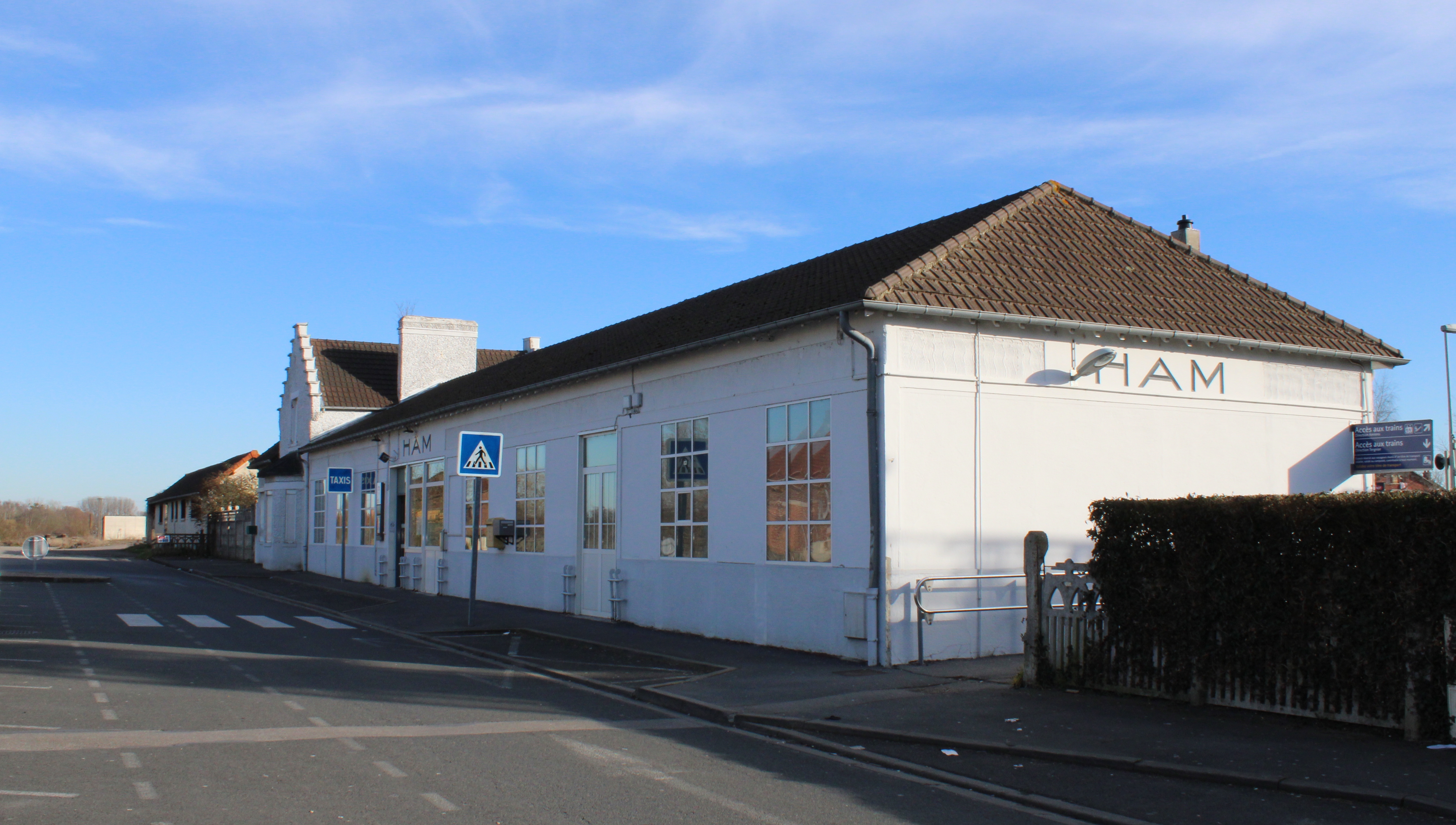 La gare de Ham côté rue en 2019.